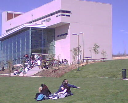 Edificio Escuela de periodismo PUCV, Campus Curauma